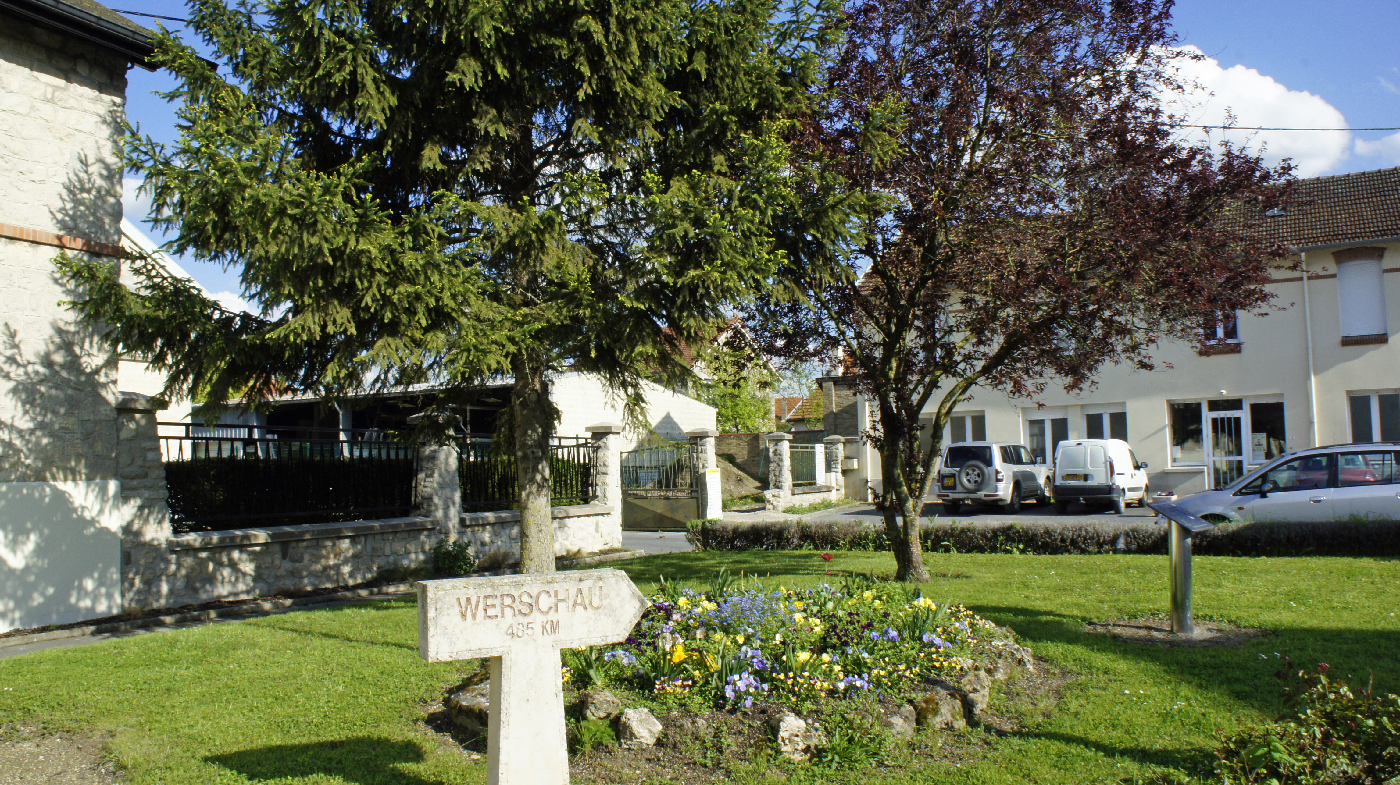 vue de Courcy.